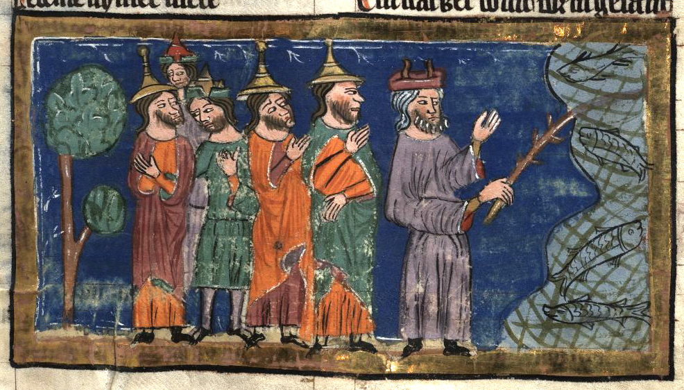 Rudolf von Ems: Weltchronik. Böhmen (Prag), 3. Viertel 14. Jahrhundert. Hochschul- und Landesbibliothek Fulda, Aa 88. Bildbeschreibung nach Martin Roland. Miniatur 38 100r Mose teilt mit seinem Stab das Meer